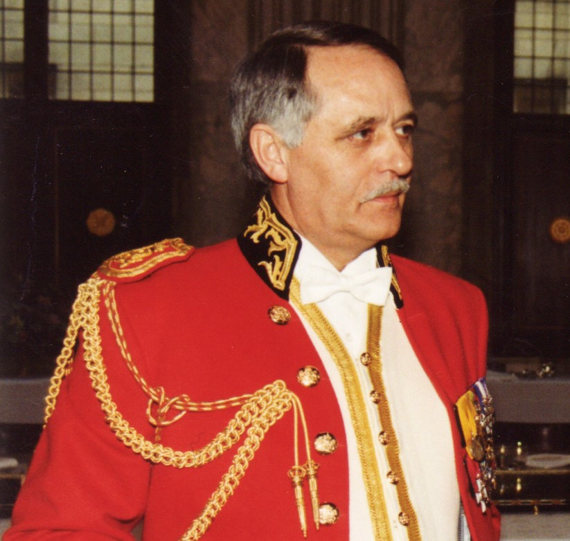 Gala tenue hoofd interne dienst